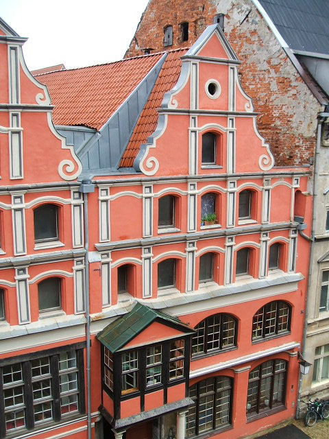 Stralsund, Giebelhaus in der Badenstraße